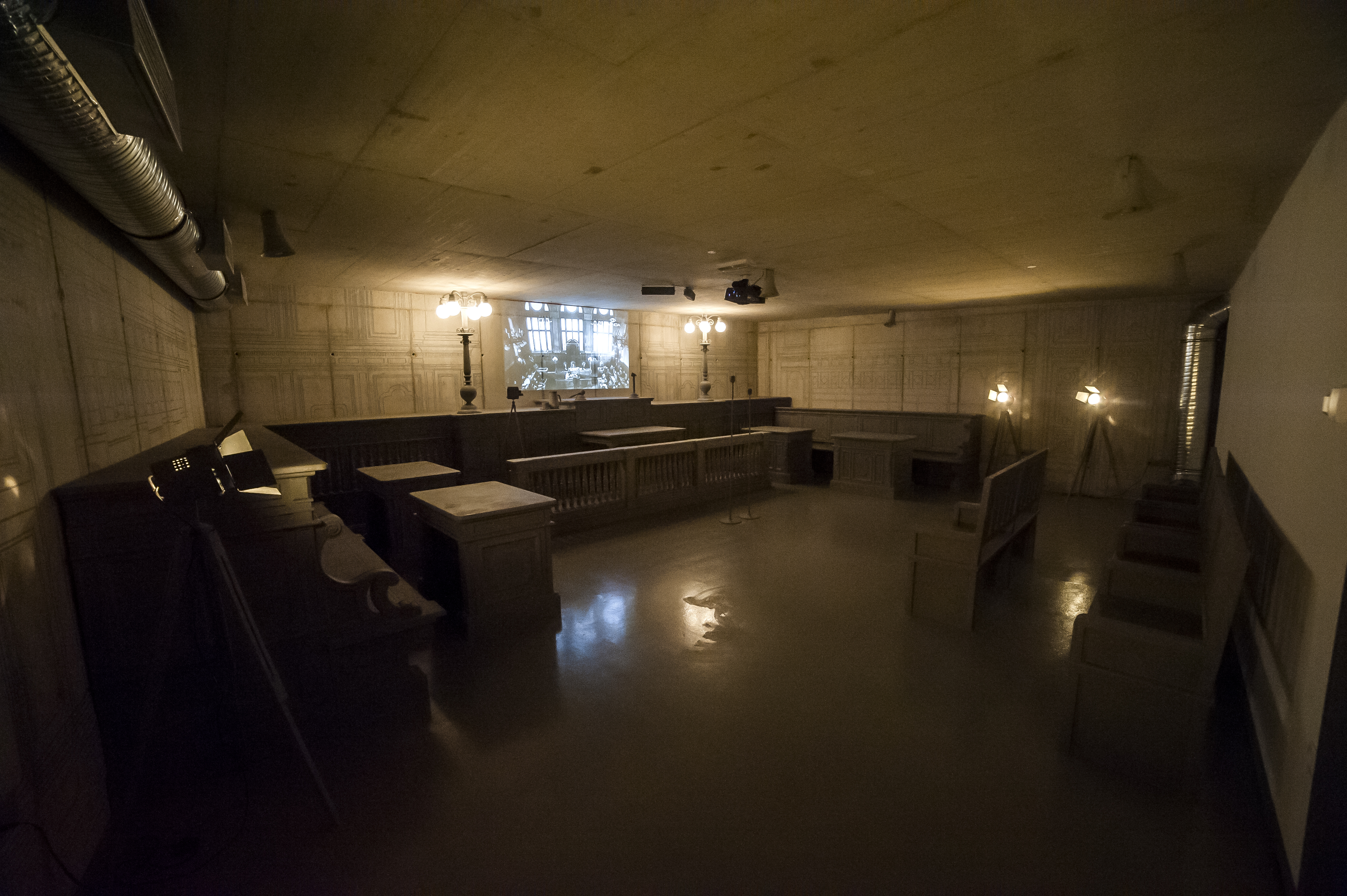 Tóth Ilona pere tárgyalótermének rekonstrukciója a Tóth Ilonka Emlékházban (első fokon a per a Fővárosi Bíróságon zajlott)